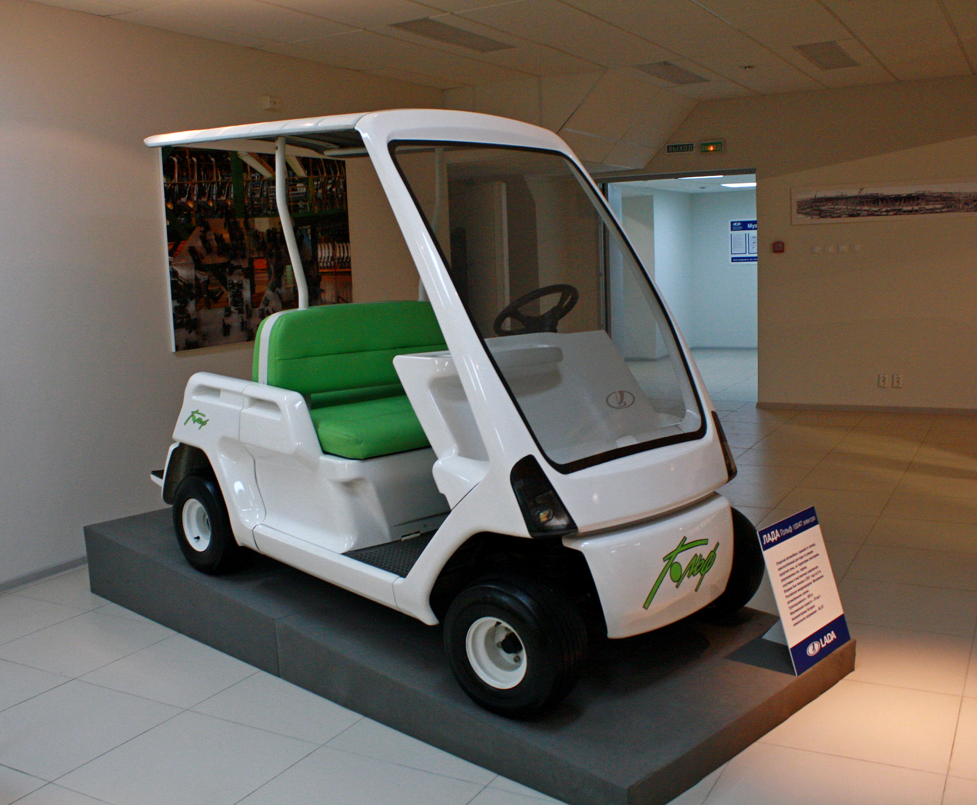 Открытый автомобиль с крышей от солнца, приспособленный для езды по улицам курортной зоны, на территории санаториев, рекреационных зон, парков, спортивных и выставочных комплексов. Впервые был показан в 2001 году на 5-м Российском международным Московском автомобильном салоне. Грузоподъемность - 600 кг. Максимальная скорость 24 км/ч. Аккумуляторные батареи: номинальное напряжение - 48,8 V.